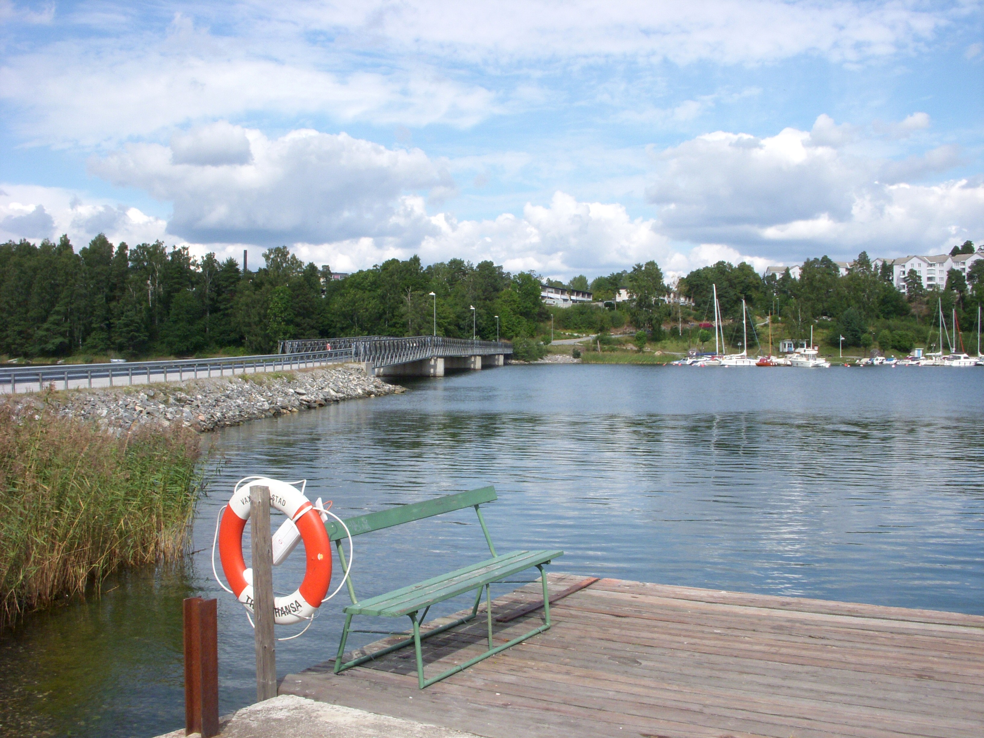 Pålsundet med Pålsundsbron från Bogesundslandet, Vaxholm